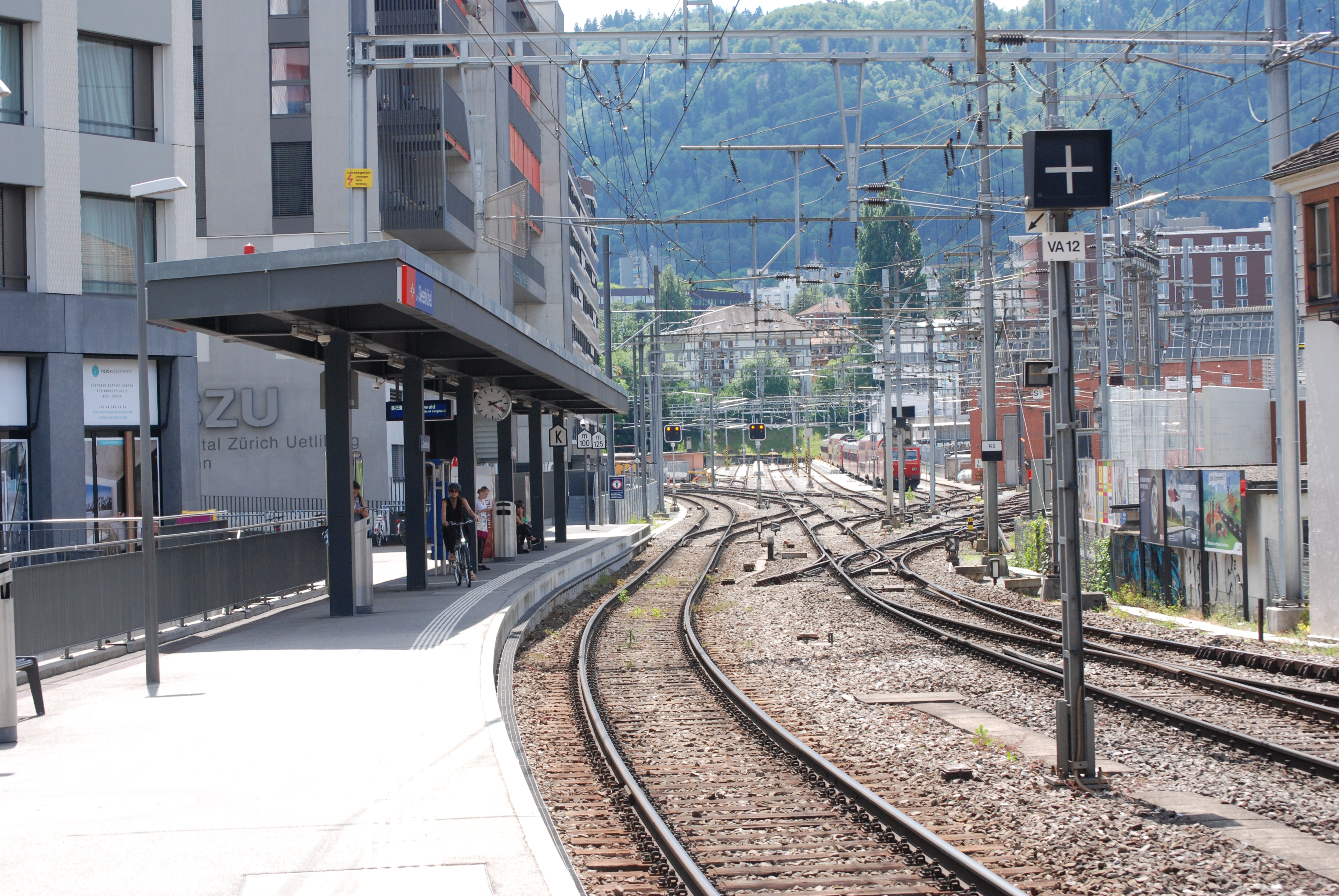 Überblick über den Bahnhof Zürich Giesshübel